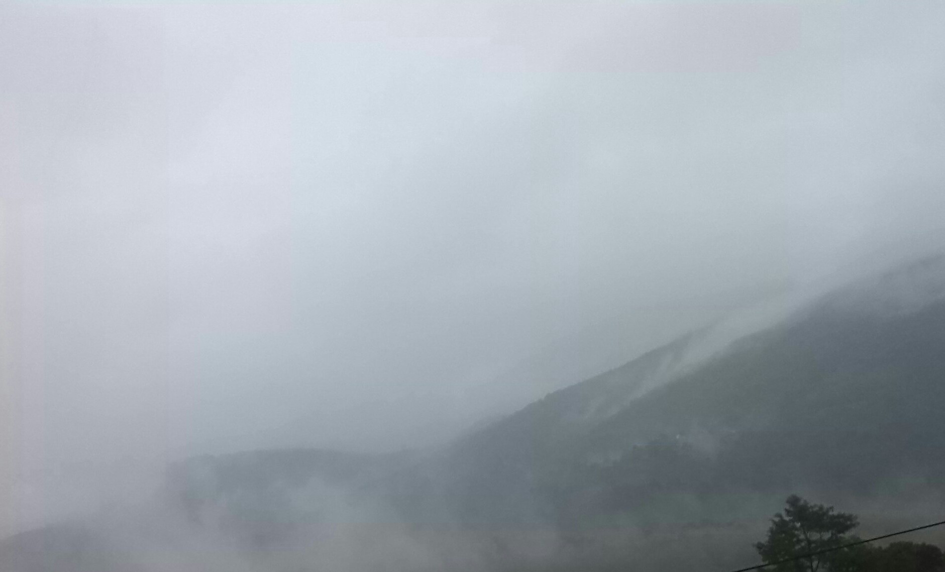 Una mañana de neblina los frios pueden llegar hasta los 10 C°